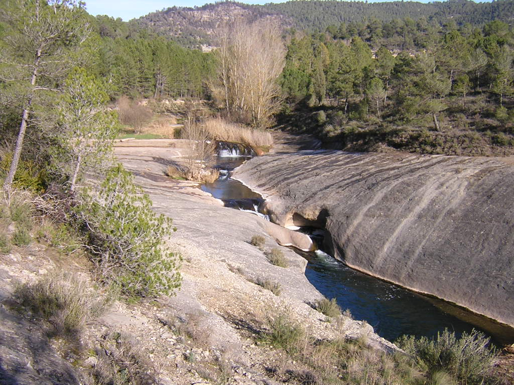 Els Gorgs Blaus (Monistrol de Calders, Moianès)